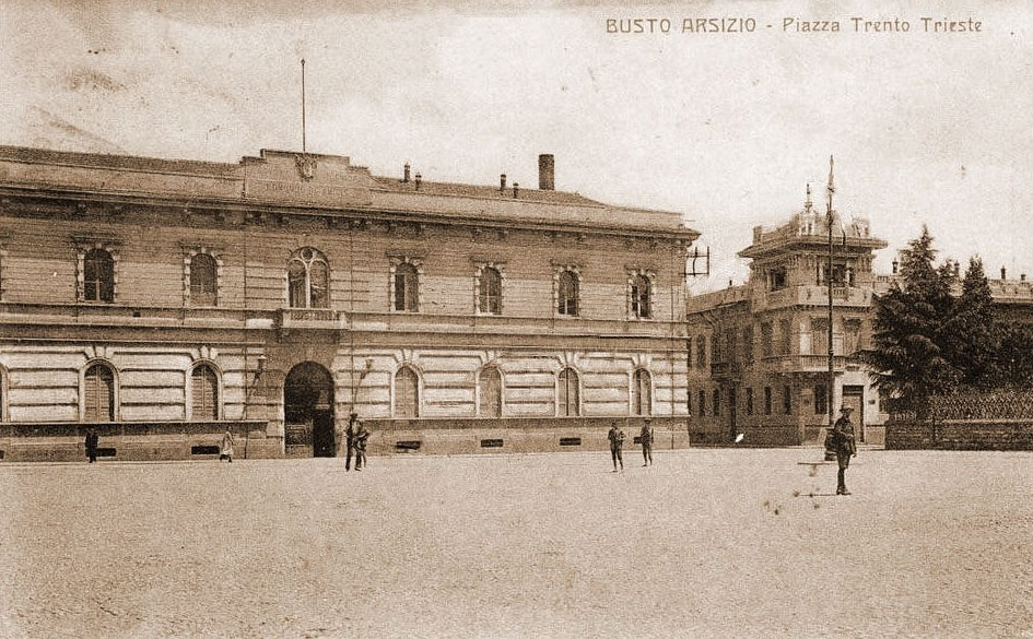 Scuole de Amicis, Casa Edoardo Gabardi, villa dott. Brunetto